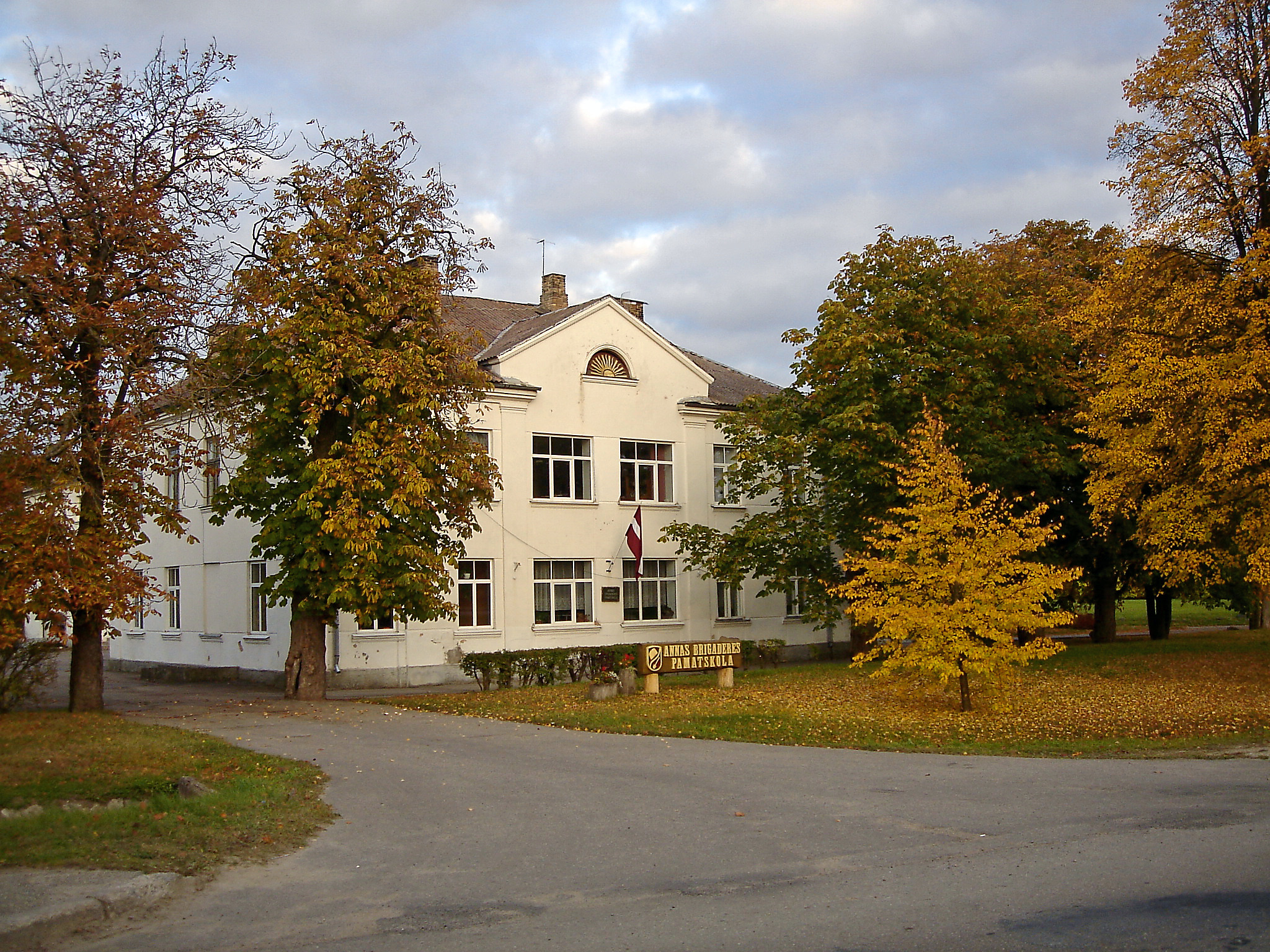 Kronauce school